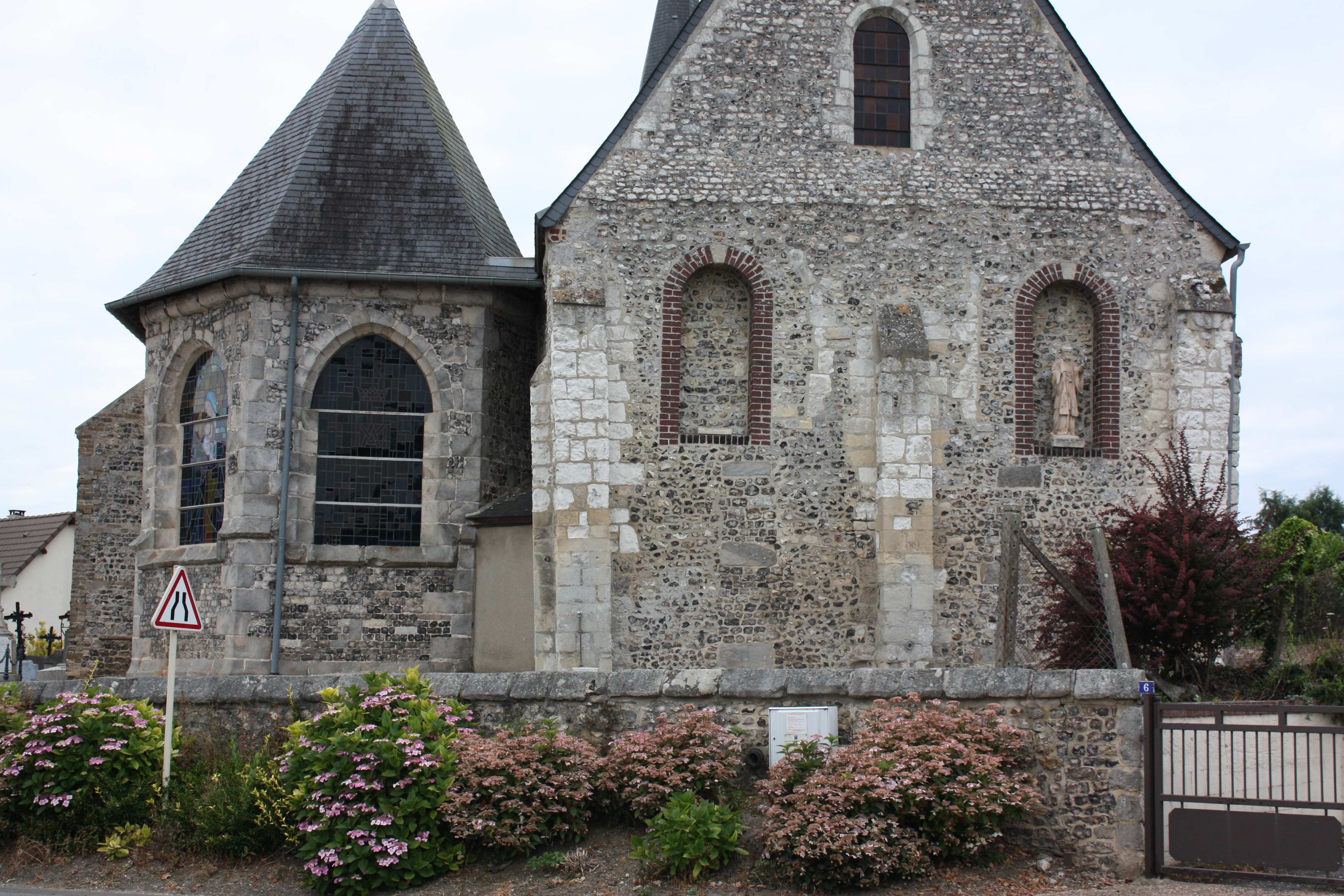 Martin-Église - Eglise Saint-Martin Vue de l'Est